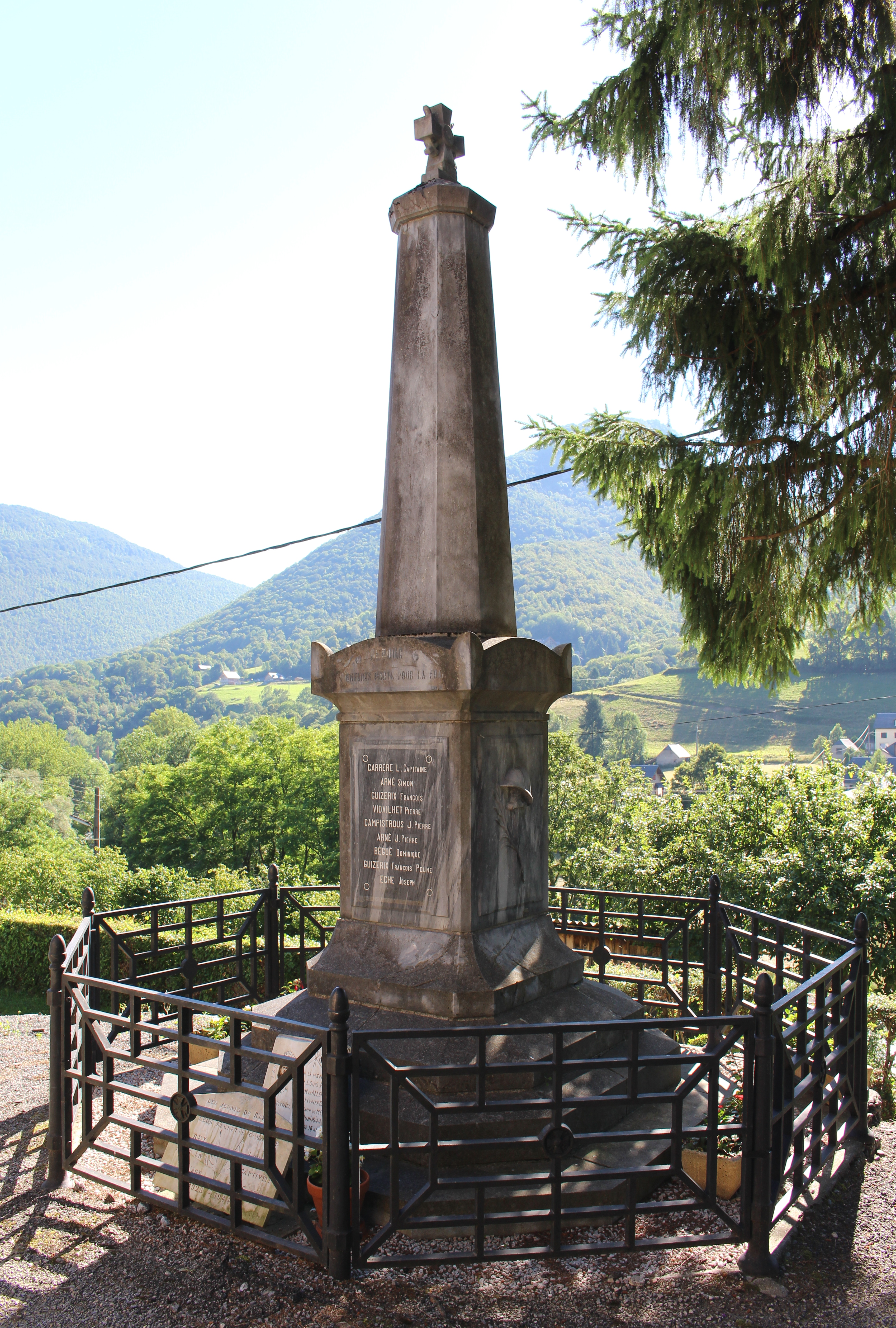 Monument aux morts de Hèches (Hautes-Pyrénées)